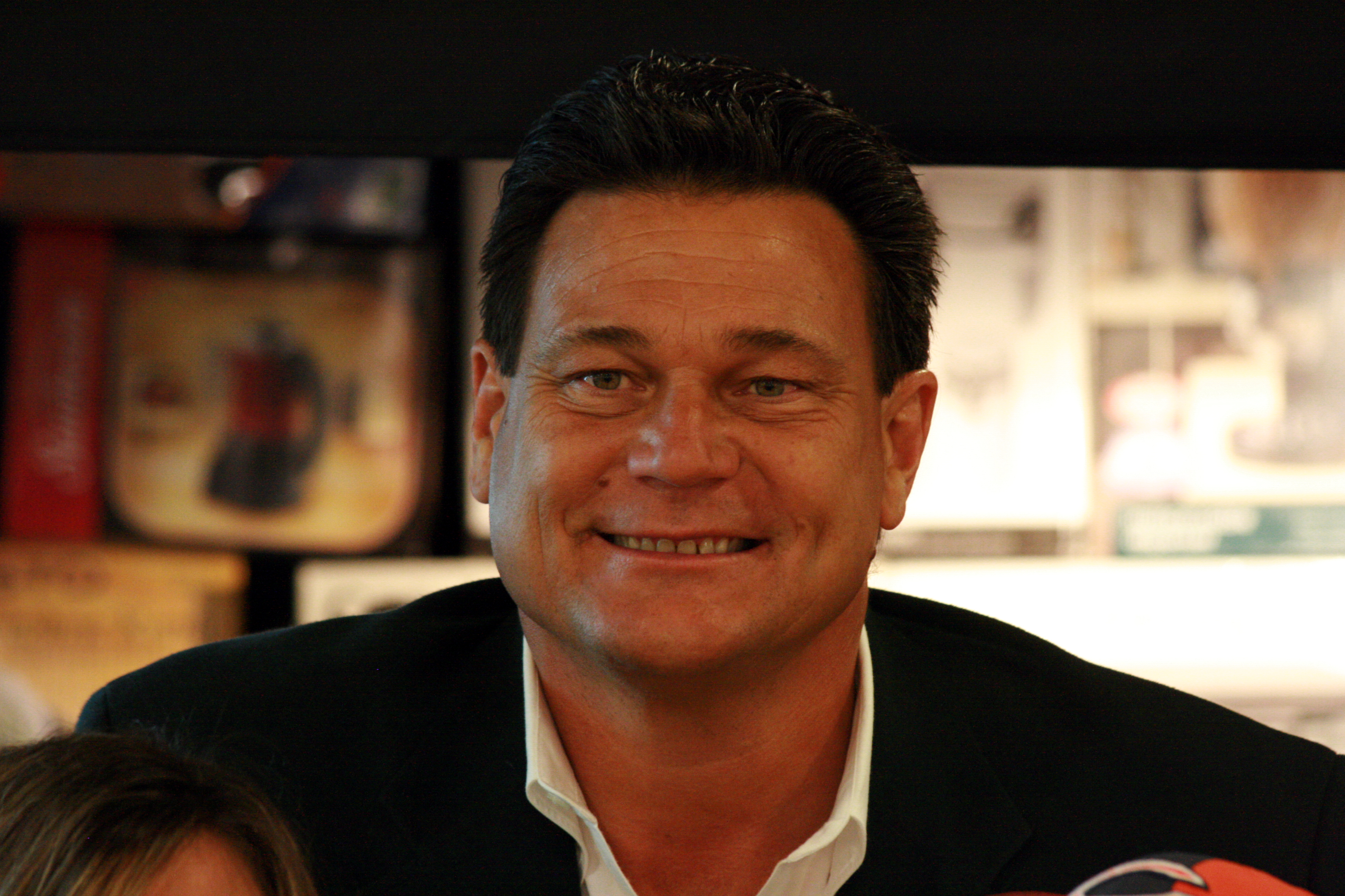 Dan Hampton